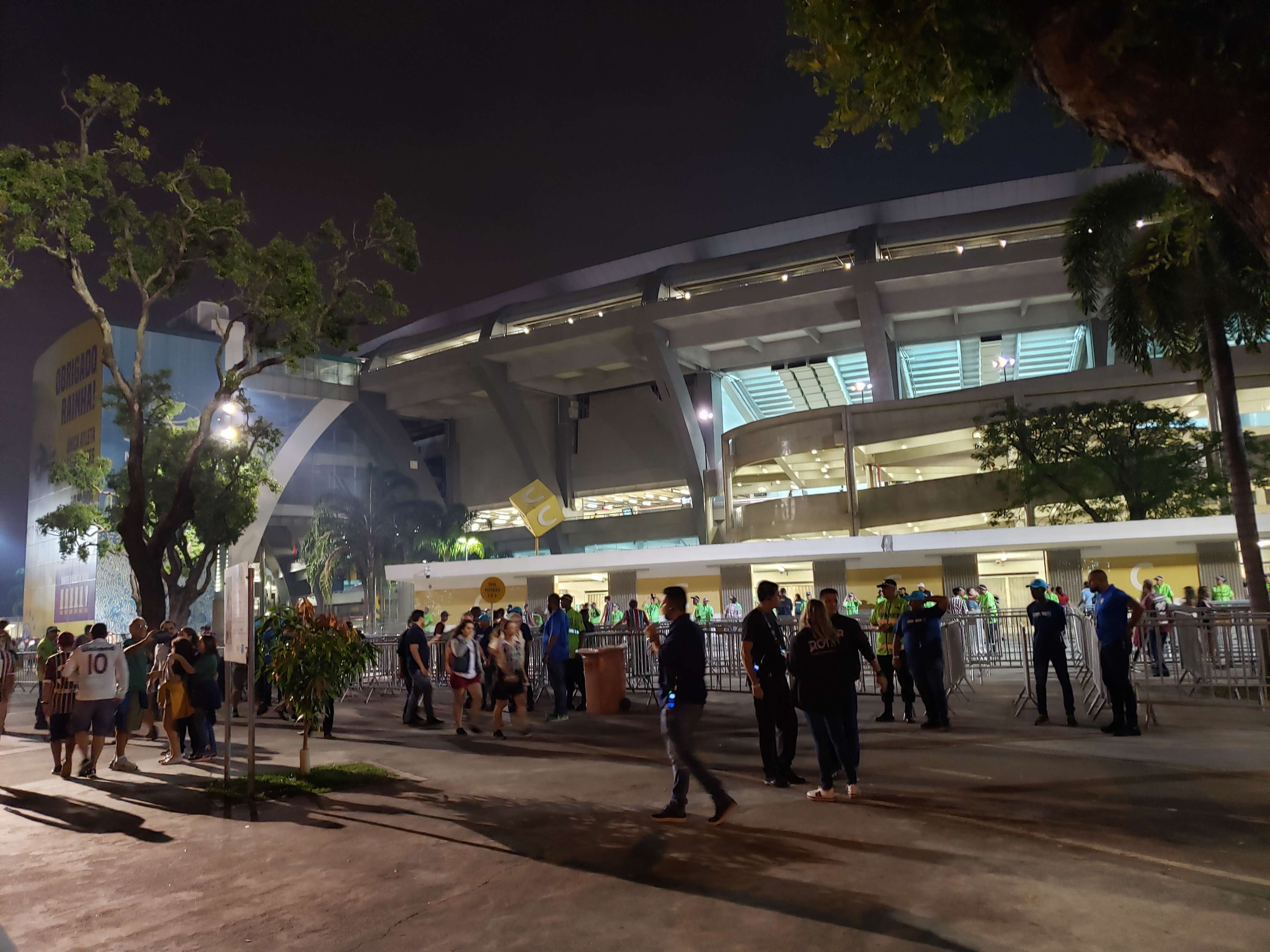 Torcida do Fluminense chegando ao Estádio do Maracanã em partida contra o Ceará pelo Campeonato Brasileiro de 2019, que recebeu 23.484 torcedores.